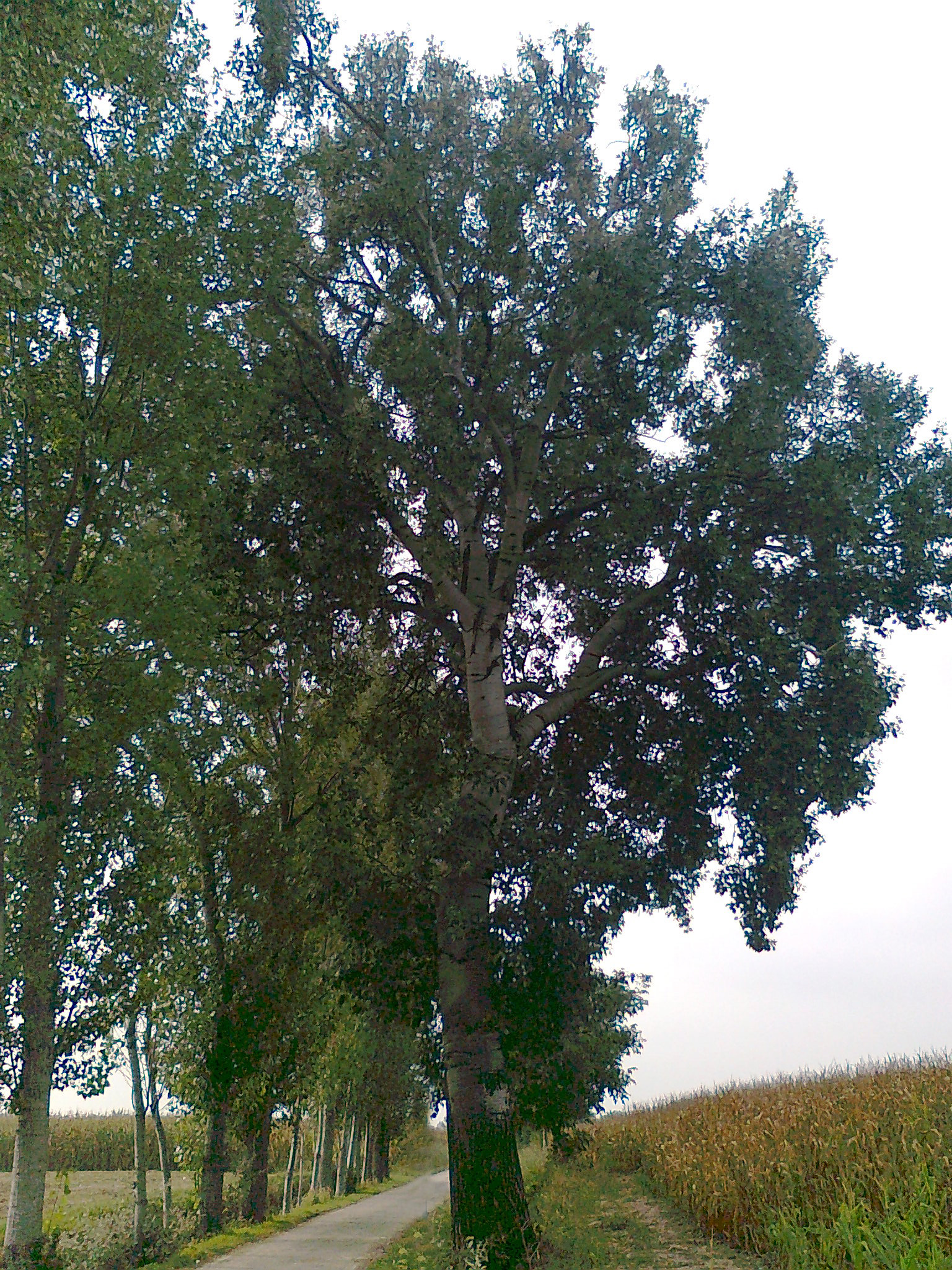 Castel Goffredo, albero monumentale (Pioppo alba, Populus alba in frazione Casalpoglio.